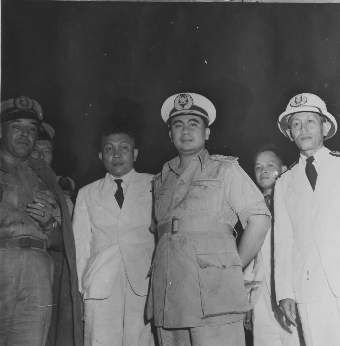 Foto. De minister-president van Oost-Indonesië, Ide Anak Agung Gde Agung, na afloop van de installatie van de Minahasa-raad op Celebes